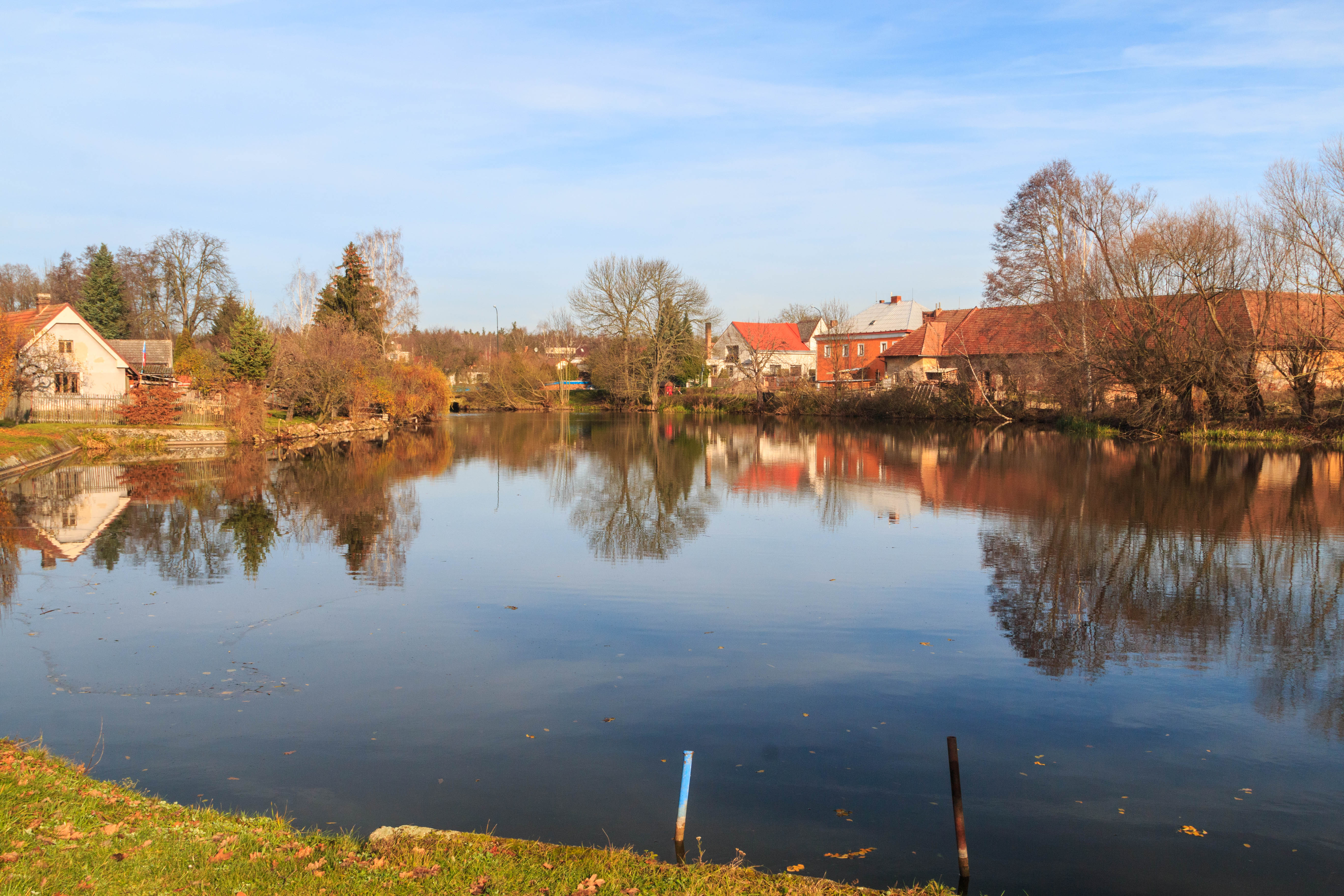 Rybník Velká Jalůvka v Semíně Project: Vodstvo.